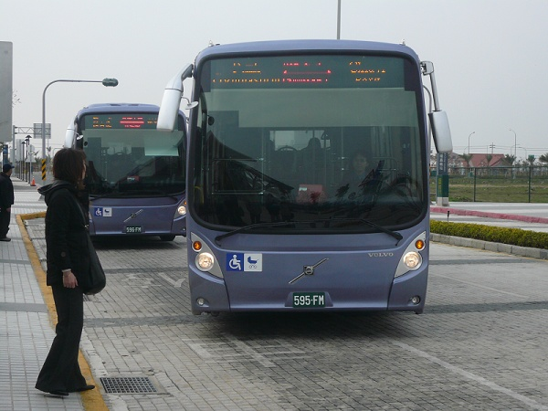 嘉義客運嘉義BRT用VOLVO B7RLE大客車595-FM。